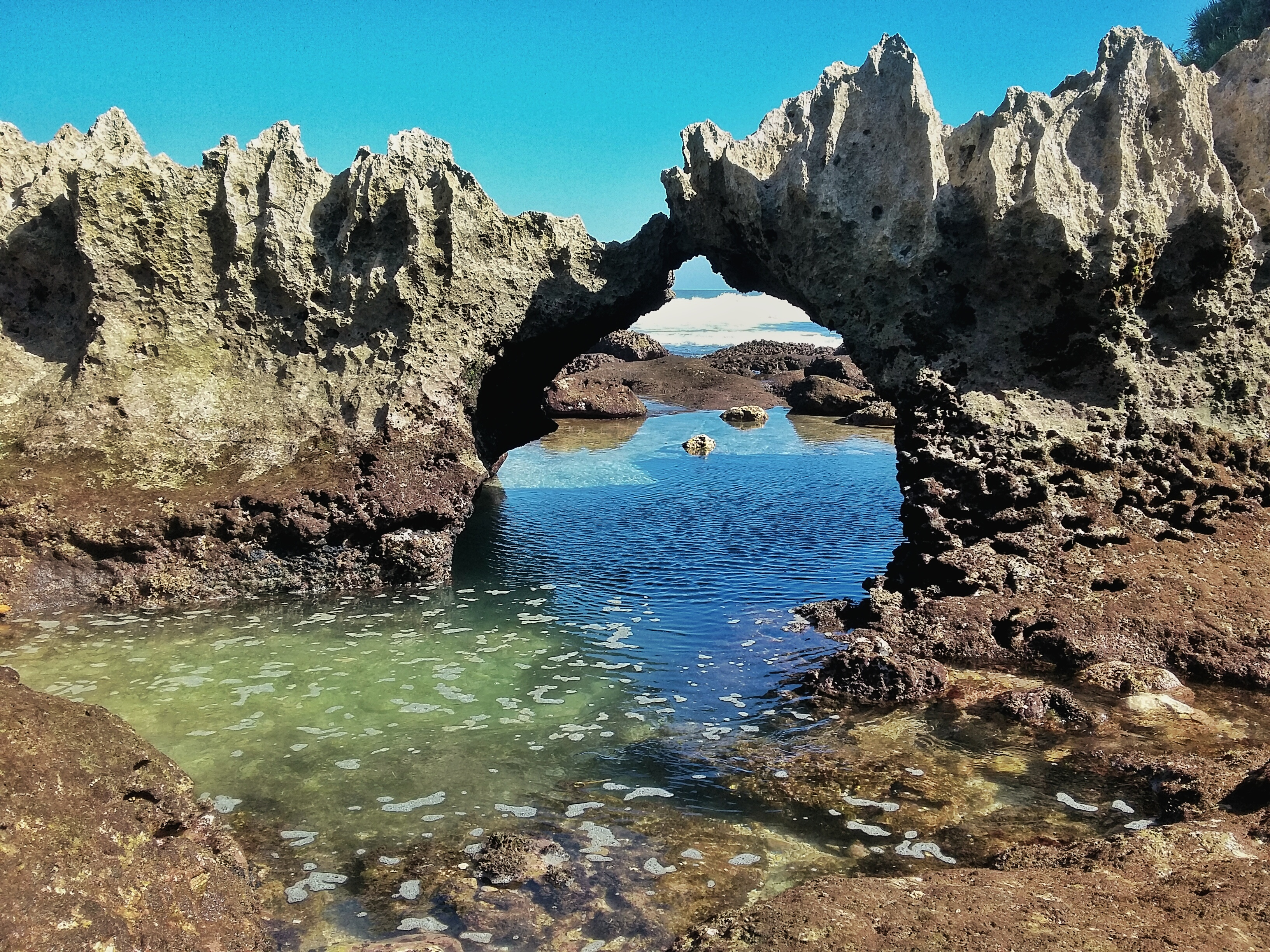 Karang bolong, Pantai Ngliyep. Terbentuk secara alami karena tergerus ombak laut selatan